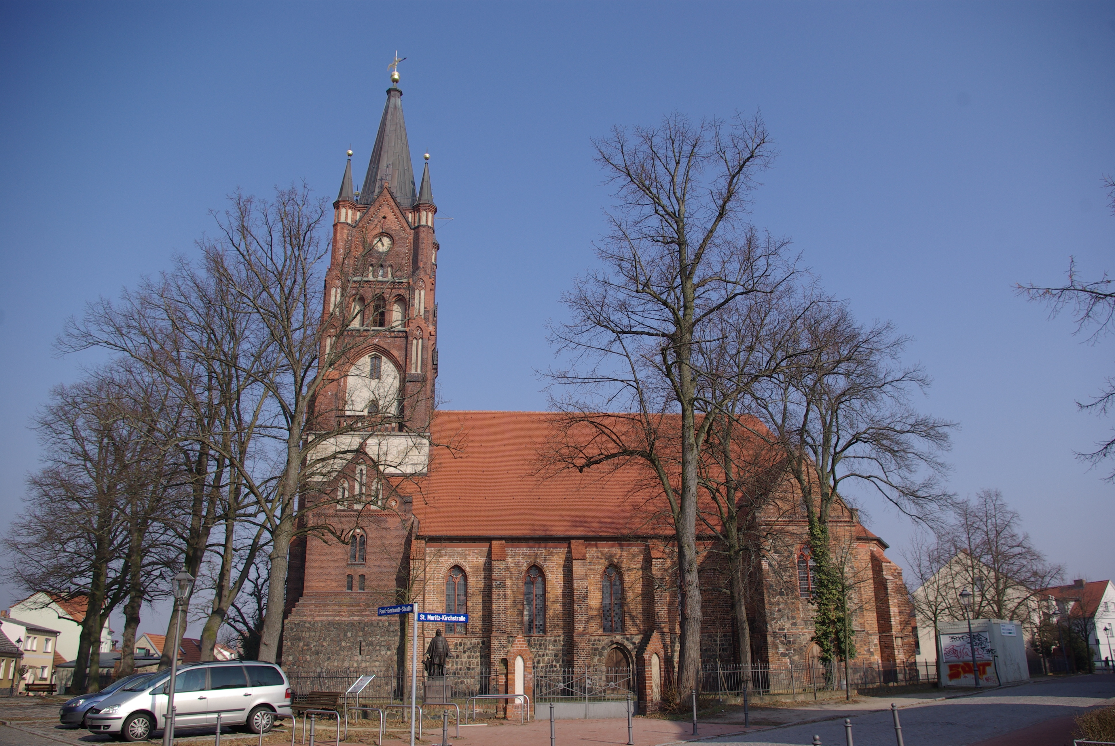 Mittenwalde in Brandenburg. Die St. Moritz Kirche in Mittenwalde steht unter Denkmalschutz. Unter dem Straßenschild ist das Denkmal an Paul Gerhardt sichtbar.